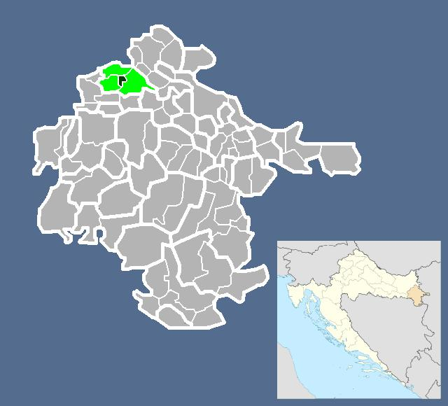 Српски (ћирилица): Вуковарско-сремска жупанија- Млака Антинска.